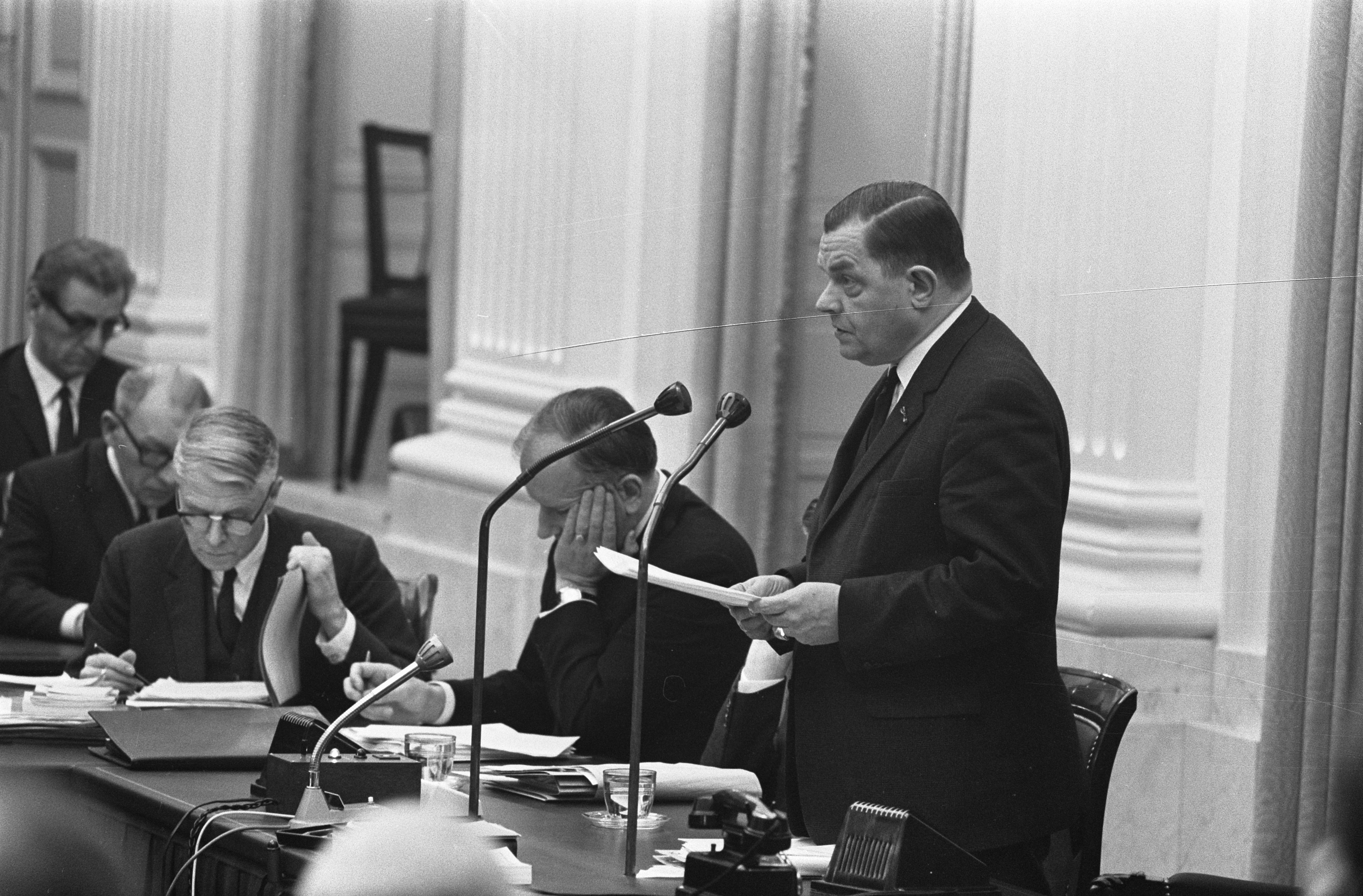 Collectie / Archief : Fotocollectie Anefo Reportage / Serie : [ onbekend ] Beschrijving : Minister van Buitenlandse Zaken Beernink beantwoordt vragen over de benoeming van voorzitter Rijnmond in Tweede Kamer Datum : 3 december 1968 Locatie : Den Haag, Zuid-Holland Trefwoorden : ministers, parlementaire debatten, politiek Persoonsnaam : Beernink, H.K.J. Fotograaf : Kroon, Ron / Anefo Auteursrechthebbende : Nationaal Archief Materiaalsoort : Negatief (zwart/wit) Nummer archiefinventaris : bekijk toegang 2.24.01.05 Bestanddeelnummer : 921-9108